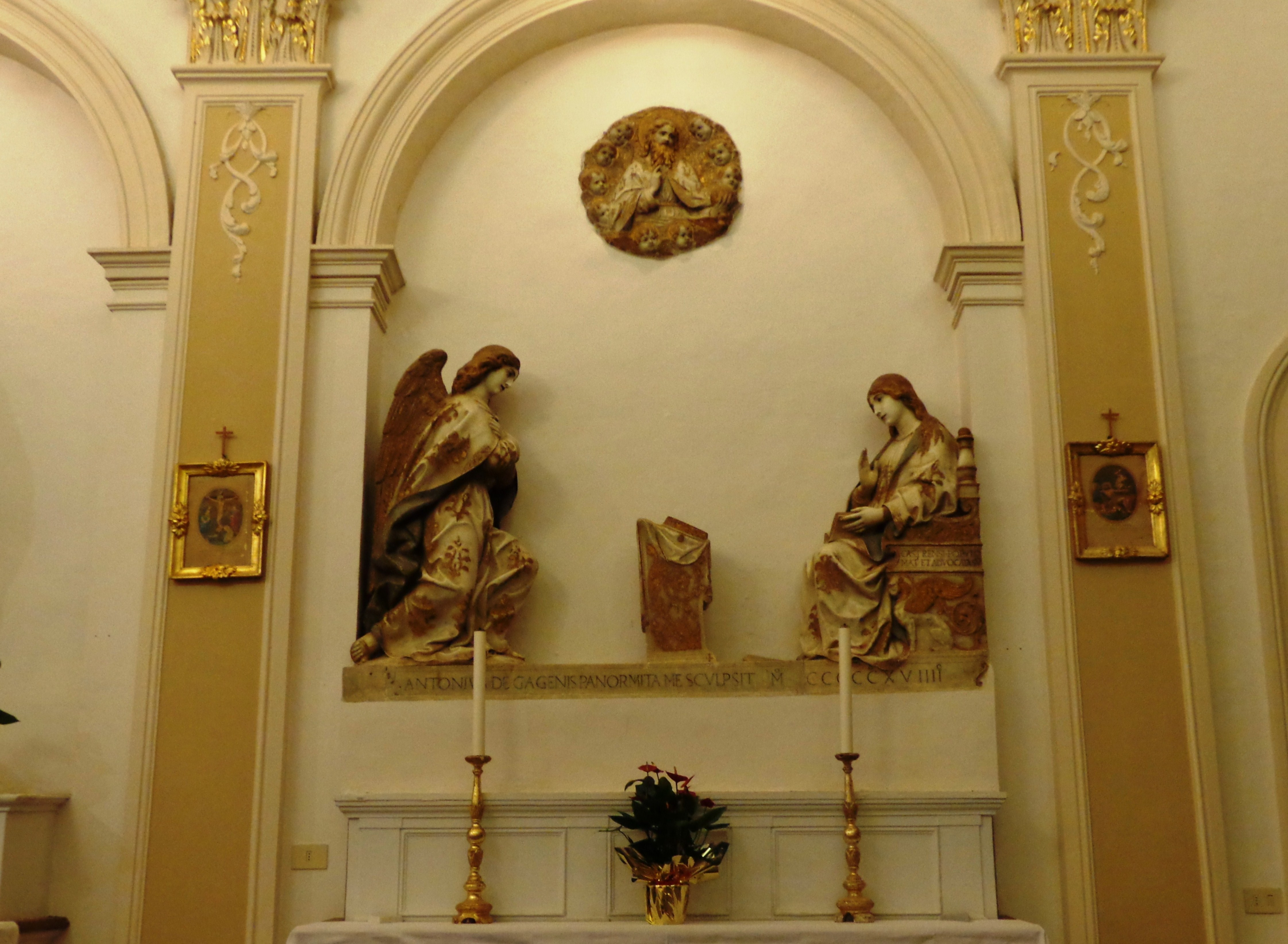 S.Agata_Castroreale_05